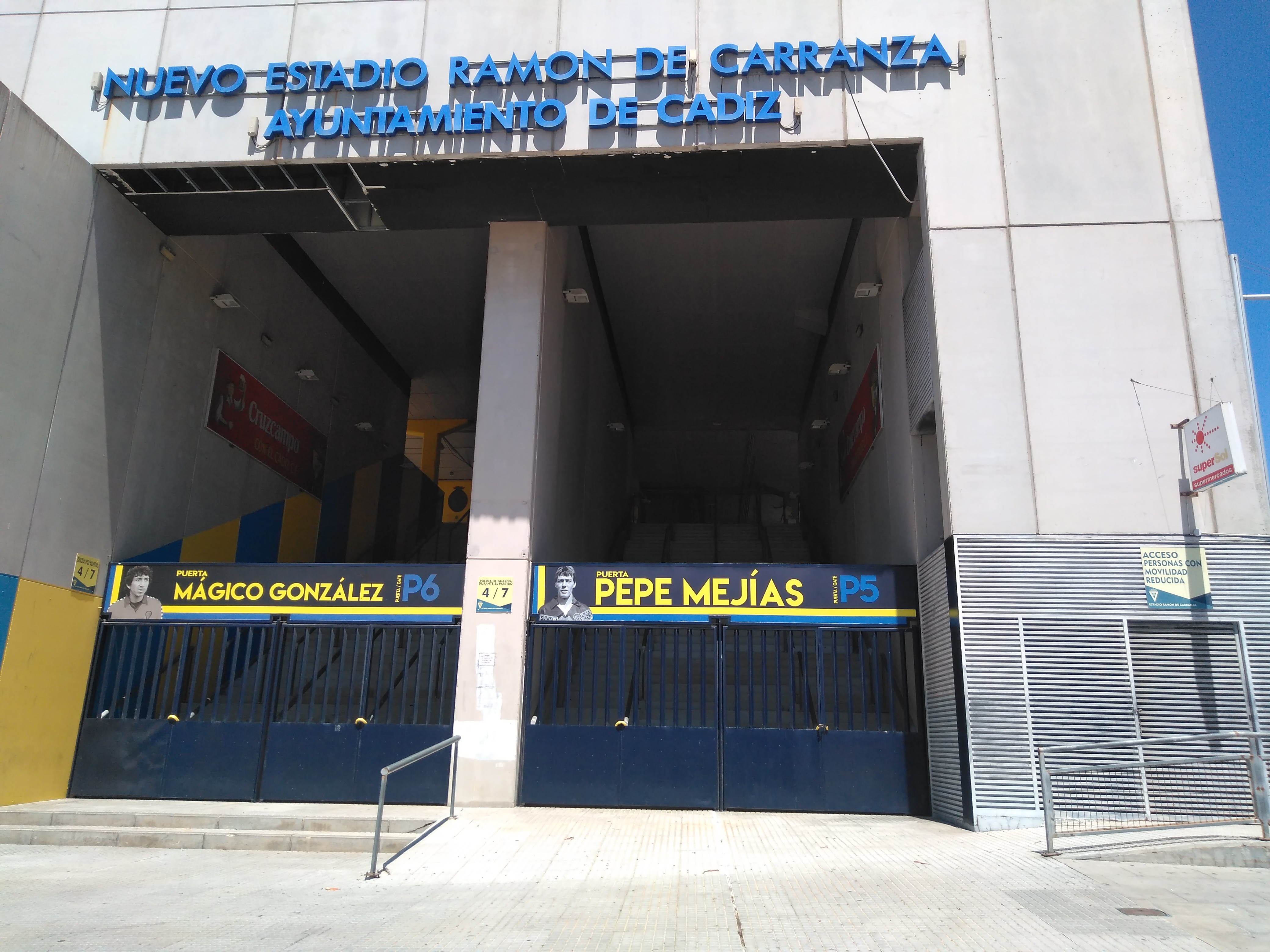 Estadio Ramón de Carranza (Cádiz, España)